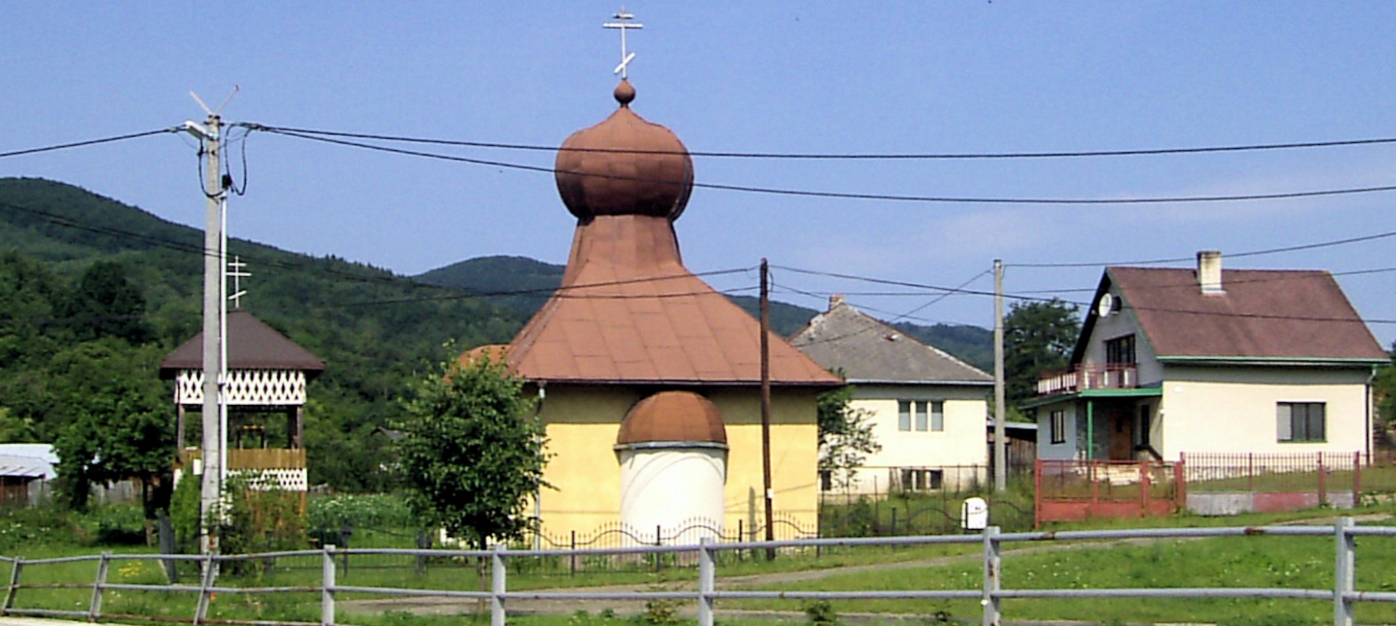 Pravoslávny kostol Nižná Jablonka